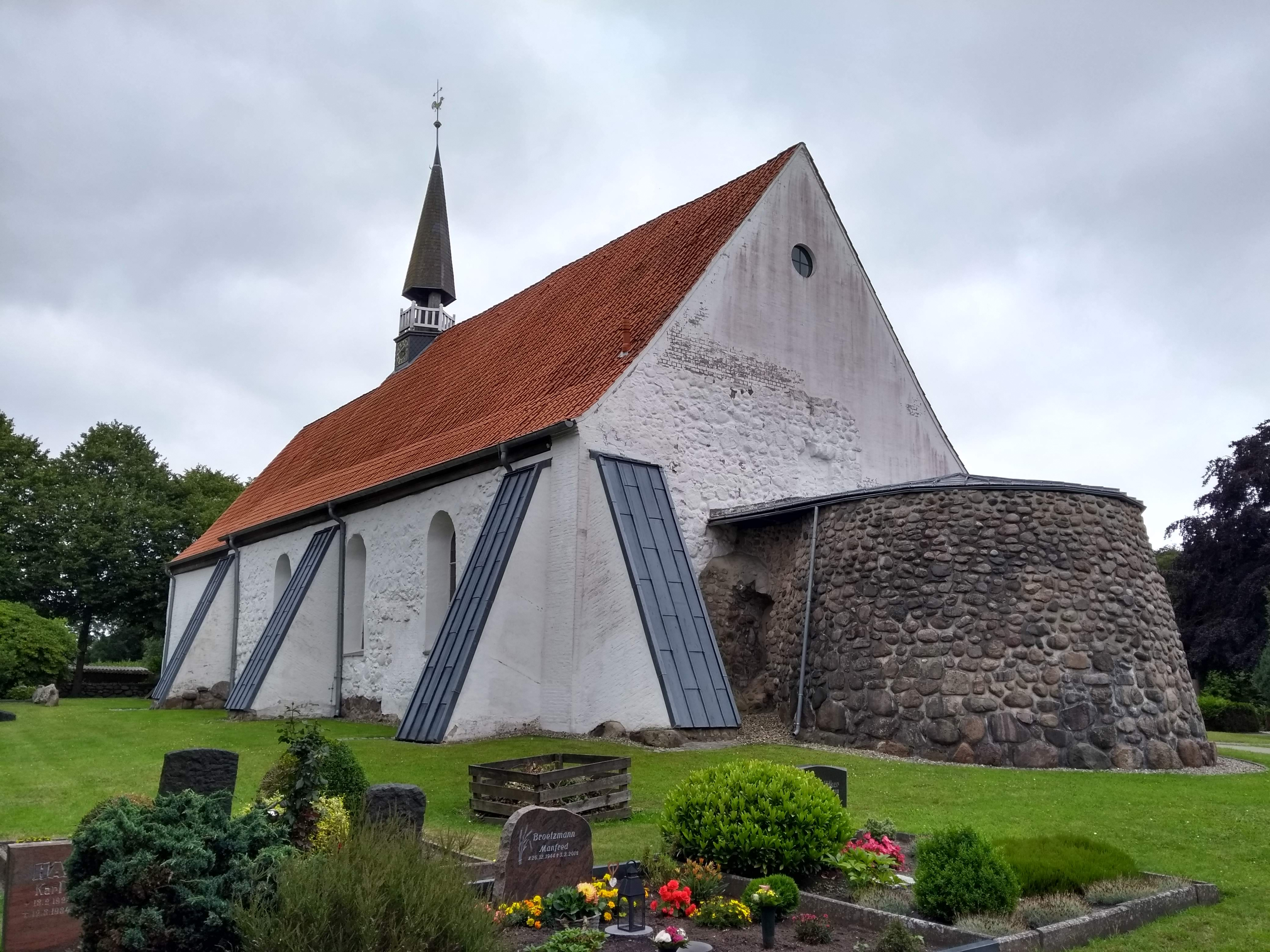 Blick von NW auf die St.-Andreas-Kirche in Weddingstedt mit dem Sumpf des in der Letzten Fehde 1559 zerstörten Rundturms